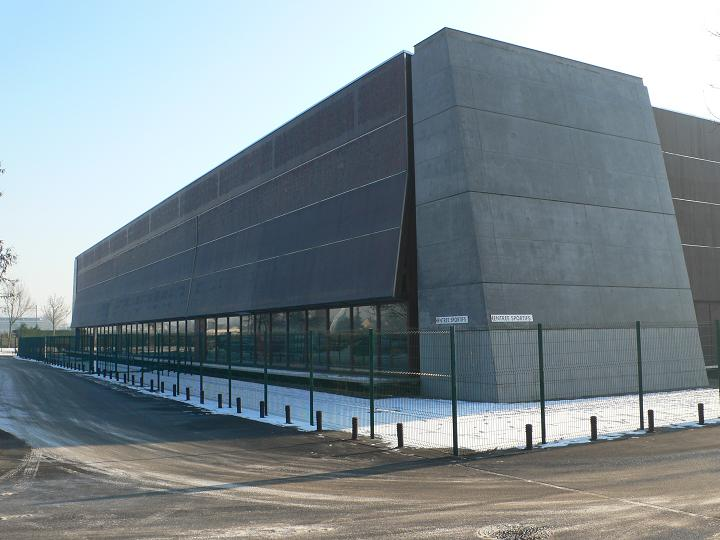 Brétigny-sur-Orge : Dojo